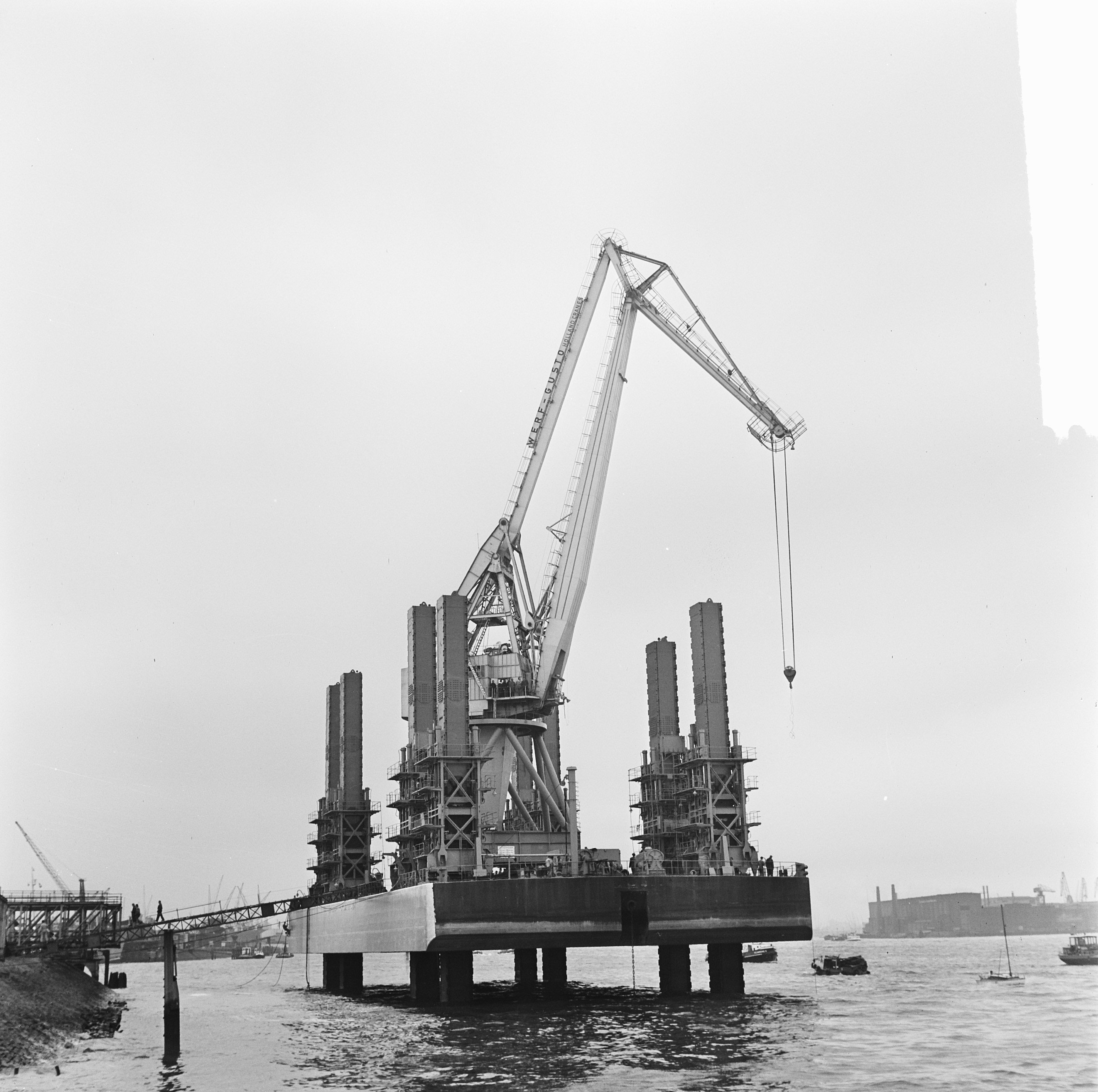 Collectie / Archief : Fotocollectie Anefo Reportage / Serie : [ onbekend ] Beschrijving : Kraaneiland Lepelaar bijna klaar, de lepelaar staat op ha poten bij de werf Gusto in Schiedam Datum : 13 mei 1964 Locatie : Schiedam, Zuid-Holland Persoonsnaam : Lepelaar Instellingsnaam : Gusto Fotograaf : Koch, Eric / Anefo Auteursrechthebbende : Nationaal Archief Materiaalsoort : Negatief (zwart/wit) Nummer archiefinventaris : bekijk toegang 2.24.01.03 Bestanddeelnummer : 916-4331